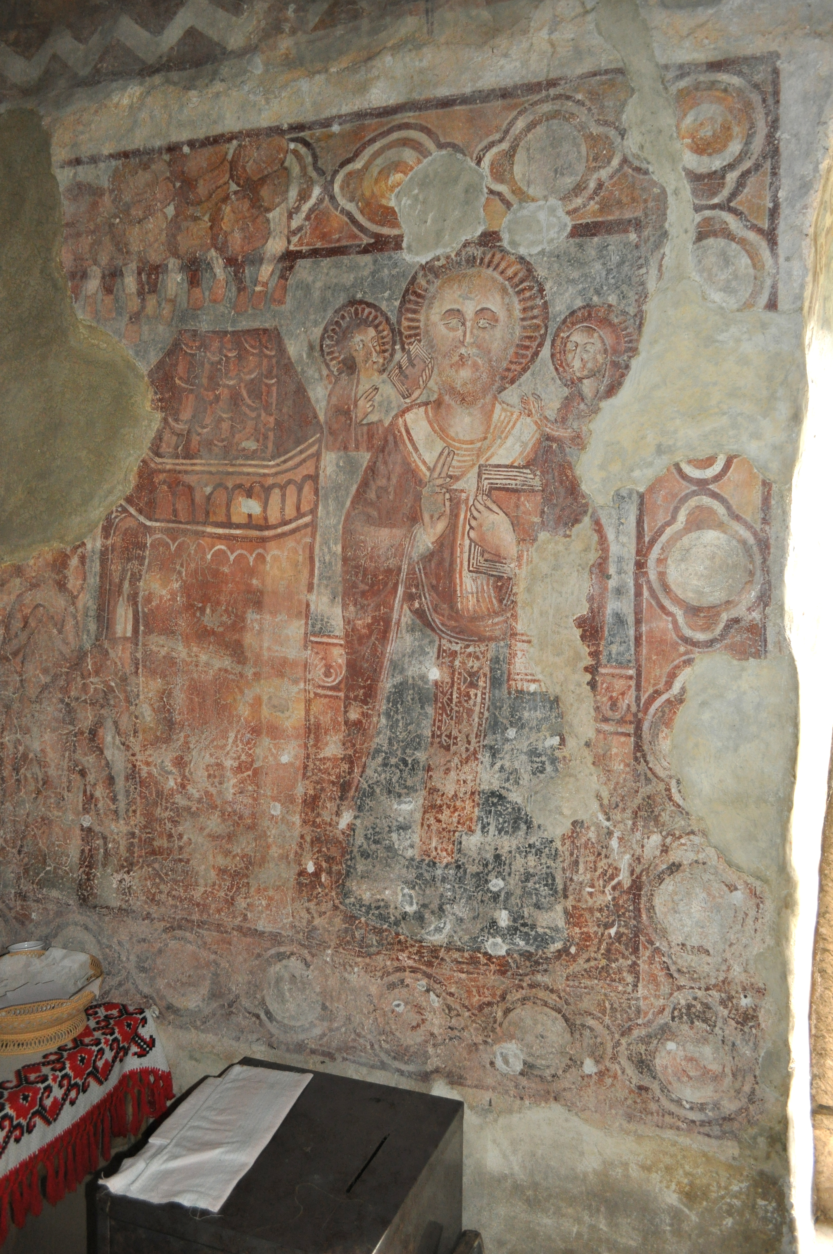 Biserica „Adormirea Maicii Domnului”, sat aparținător Strei; oraș Călan